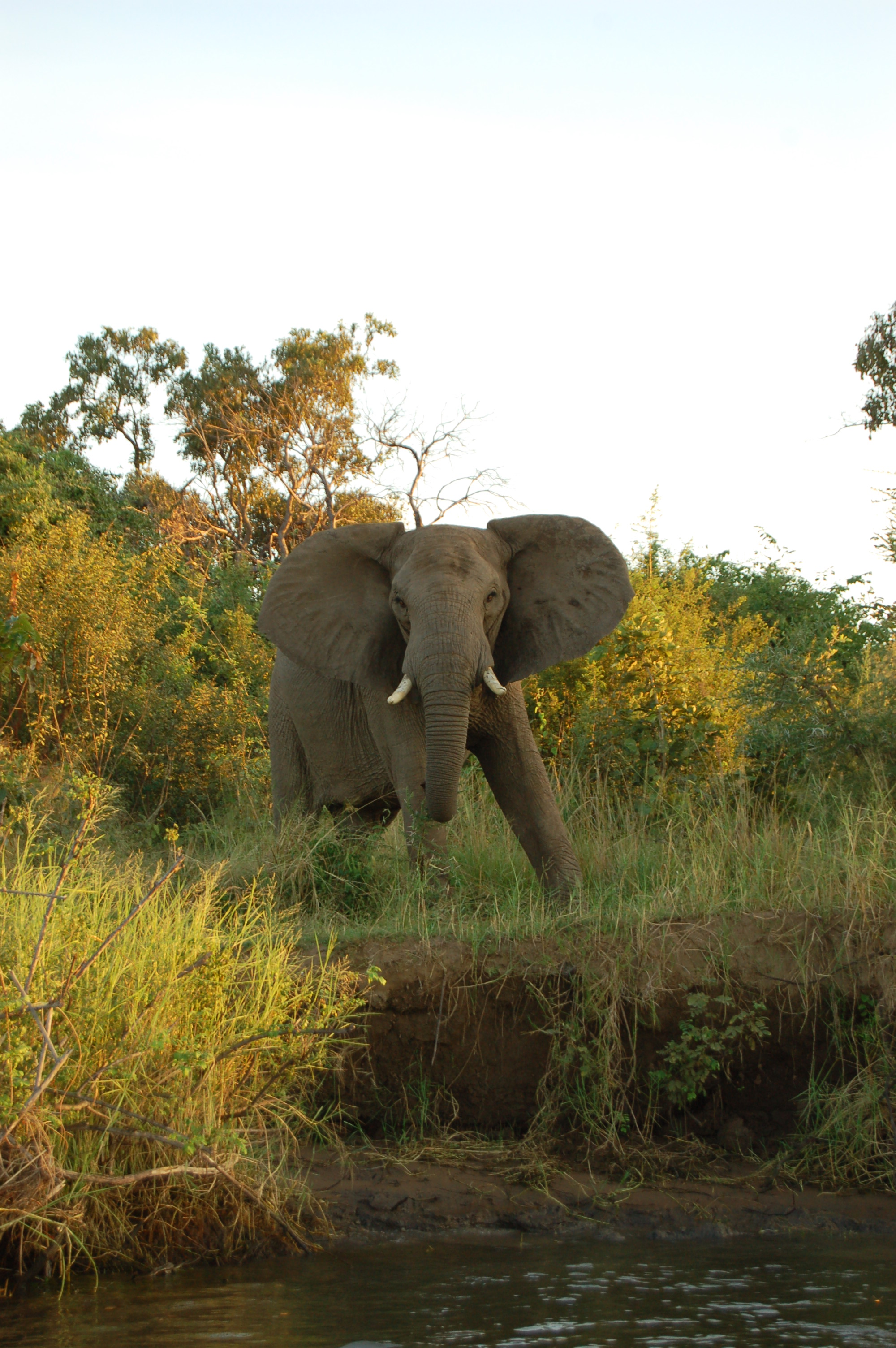 Lower Zambezi, Zambia